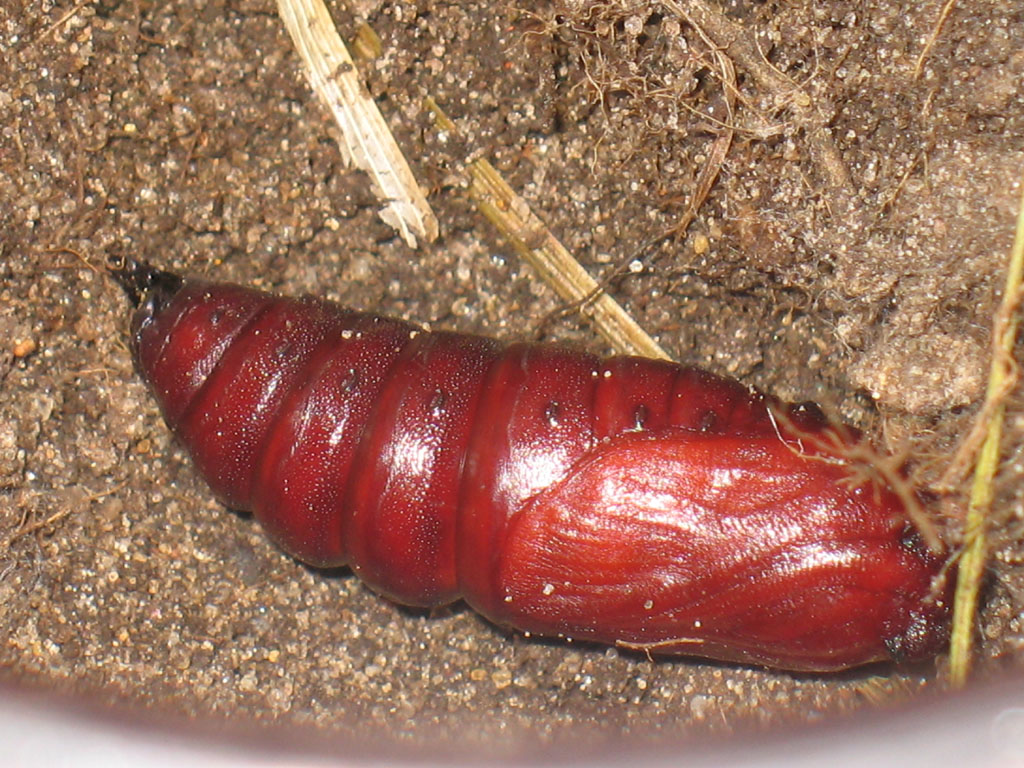 Exemplar found: Russia, Moscow Oblast, Orekhovo-Zuyevsky District, near station Antsiferovo, 07.07.2007 МО, Орехово-Зуевский р-н, окрестности станции Анциферово, 07.07.2007